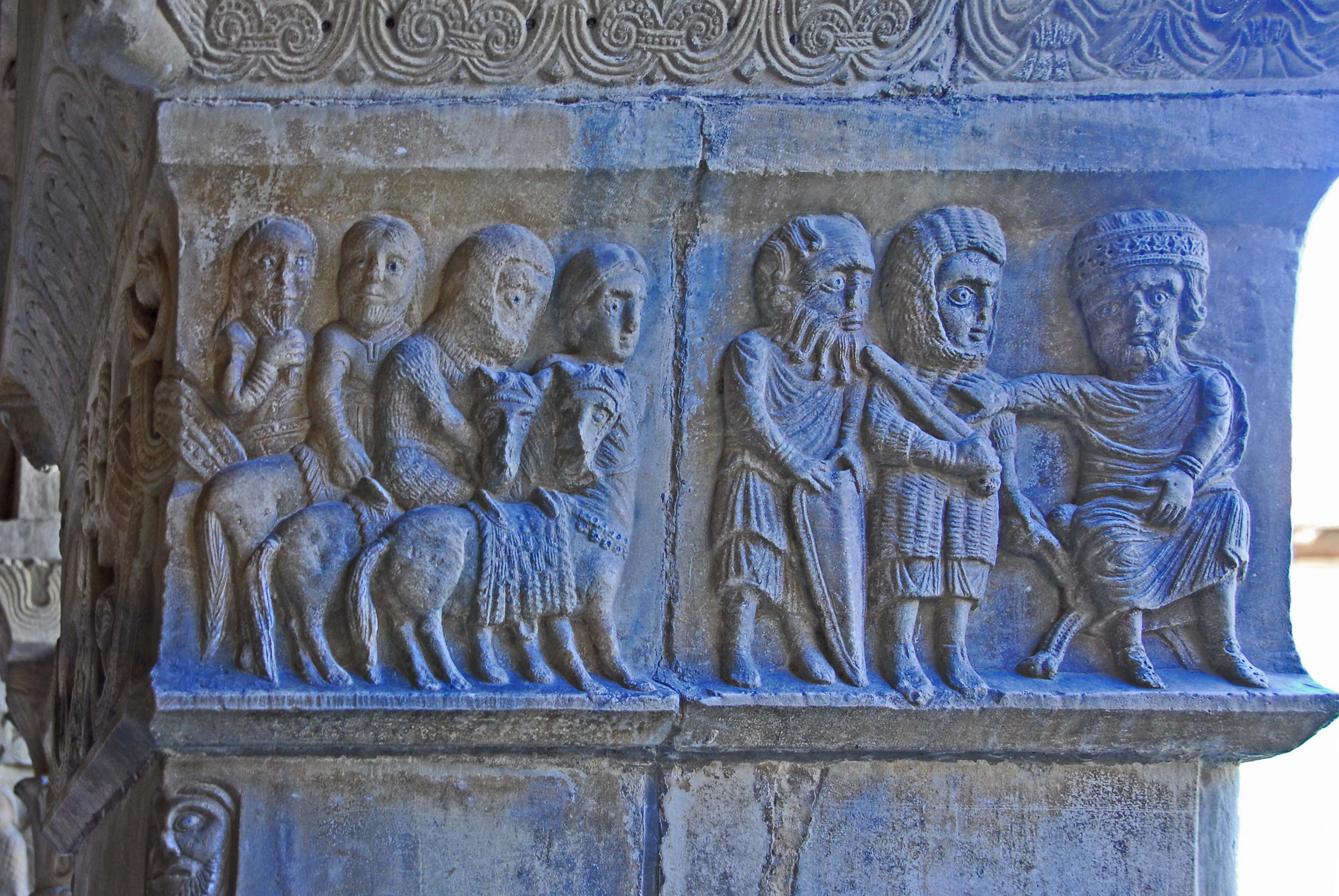 Ste-Eulalie-et-Ste-Julie_d’Elne, Pfeilerkapitell, Südgalerie, König mit Rittern